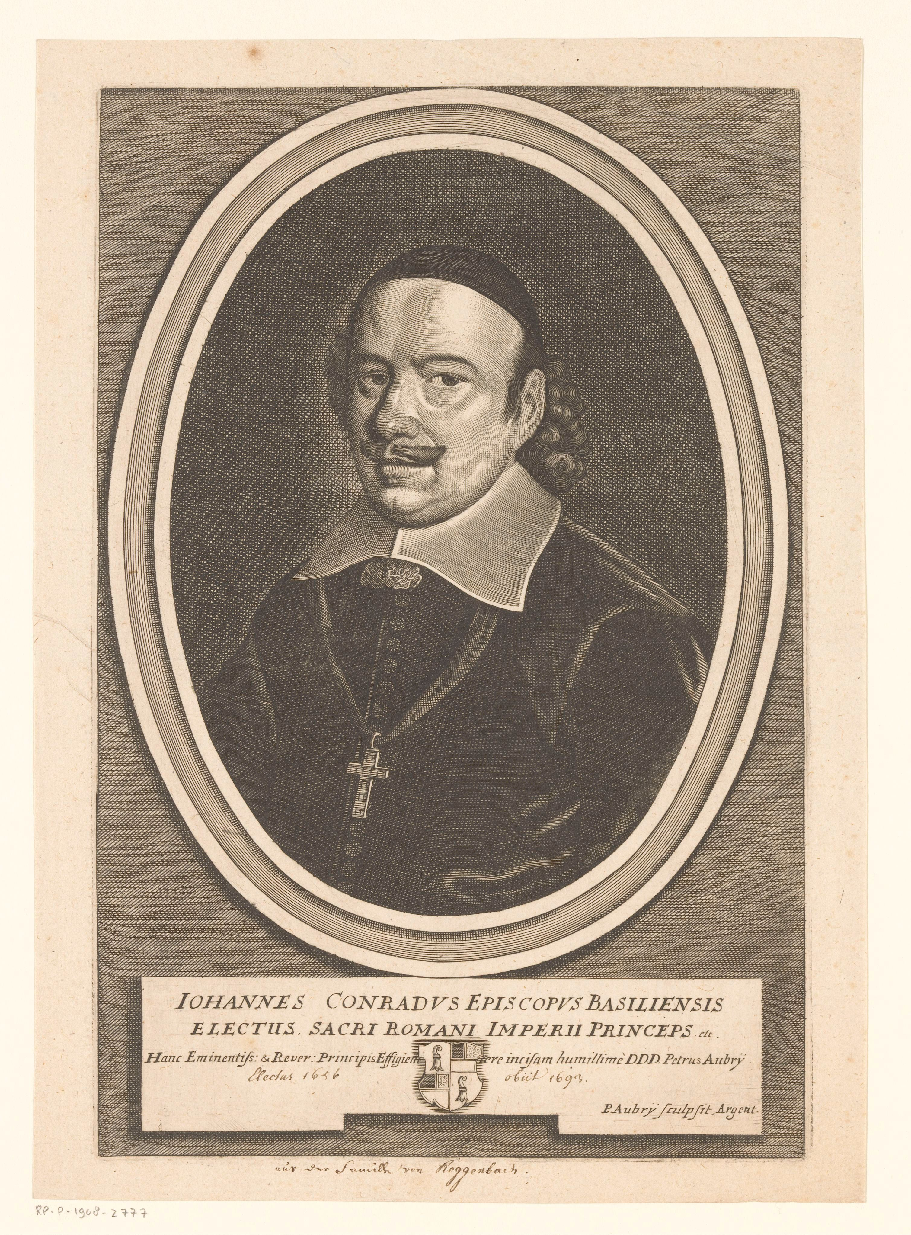 IdentificatieTitel(s): Portret van Johann Konrad, bisschop van BazelJohannes Conradus episcopus Basiliensis (titel op object)Objecttype: prent Objectnummer: RP-P-1908-2777Opschriften / Merken: verzamelaarsmerk, verso, gestempeld: Lugt 2228opschrift, recto, geschreven in pen: ‘electus 1656 / obiit 1693 // aus der famille von Roggenbach’VervaardigingVervaardiger: prentmaker: Peter Aubry (II) (vermeld op object)Plaats vervaardiging: StraatsburgDatering: 1658 - 1686Fysieke kenmerken: gravureMateriaal: papier Techniek: graveren (drukprocedé)Afmetingen: plaatrand: h 285 mm × b 190 mmOnderwerpWat: historical personsWie: bisschop van Bazel Johann KonradVerwerving en rechtenVerwerving: aankoop 1905Copyright: Publiek domein